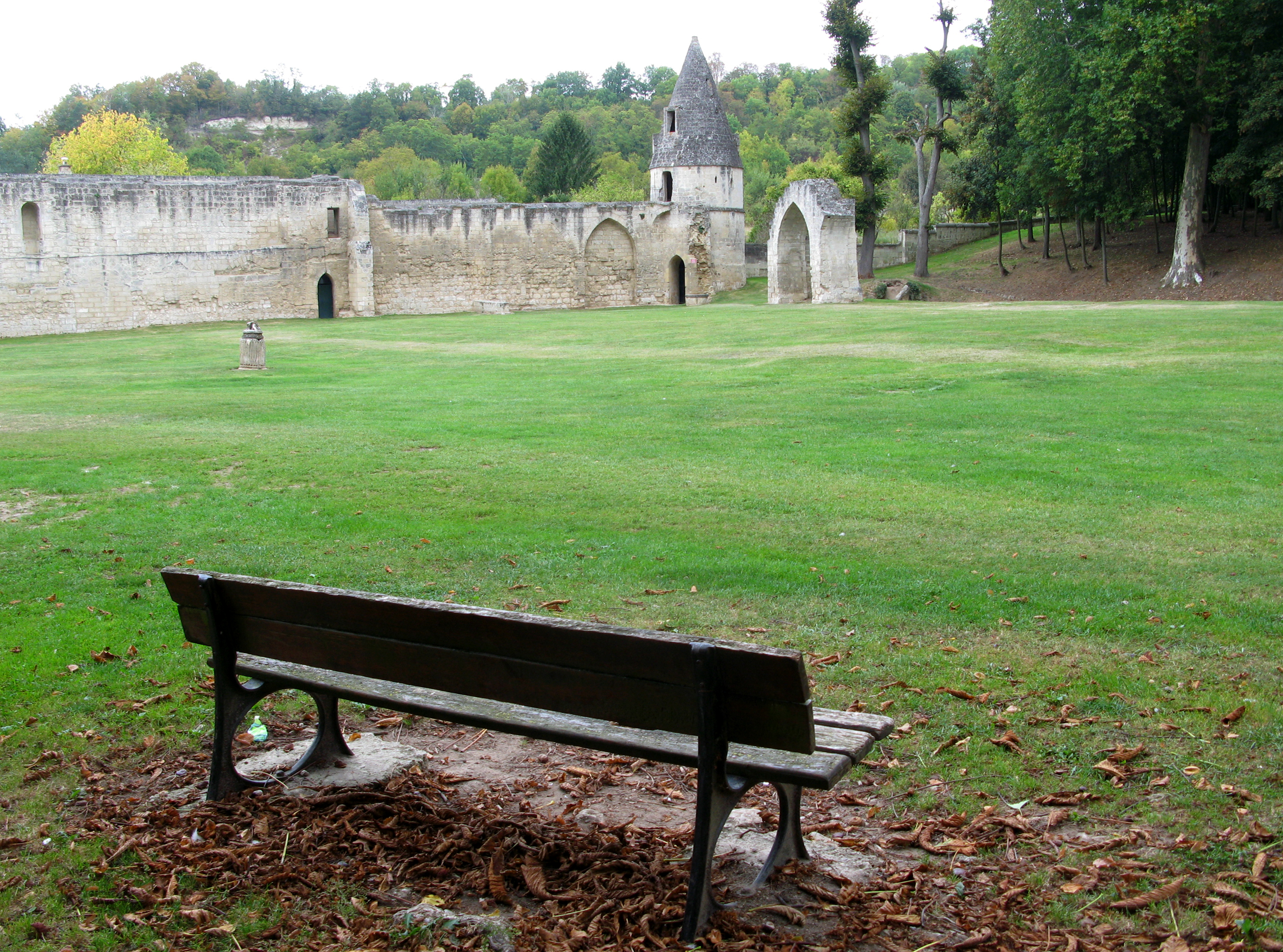 Septmonts (Aisne, France) - Le parc du château, délimité par le mur d'enceinte, où subsiste une tourelle d'angle. L'arche de pierre est le vestige du prolongement de ce mur d'enceinte, derrière lequel à cet endroit se trouvaient des douves, aujourd'hui partiellement comblées (ou en tout cas désormais sans eau). . .